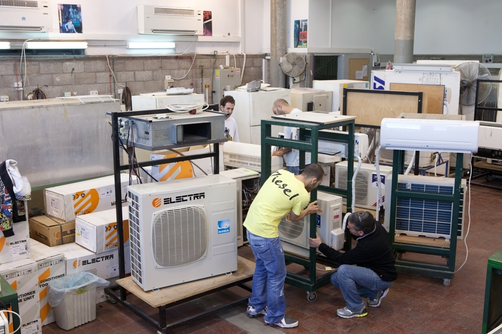 סדנת קירור ומיזוג אוויר